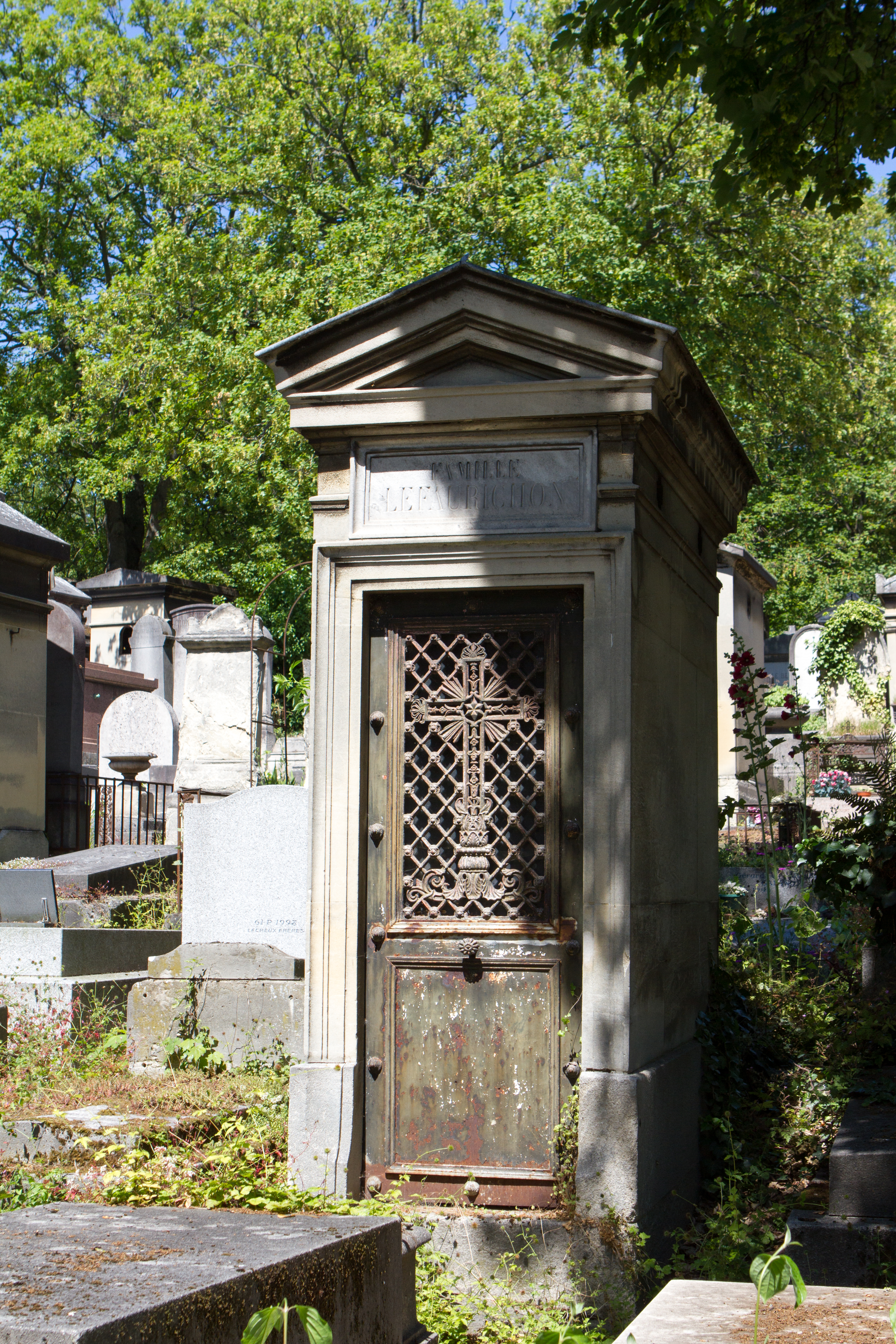 Sépulture d'André Lefaur, né Alphonse André Lefaurichon (1879-1952), acteur français.